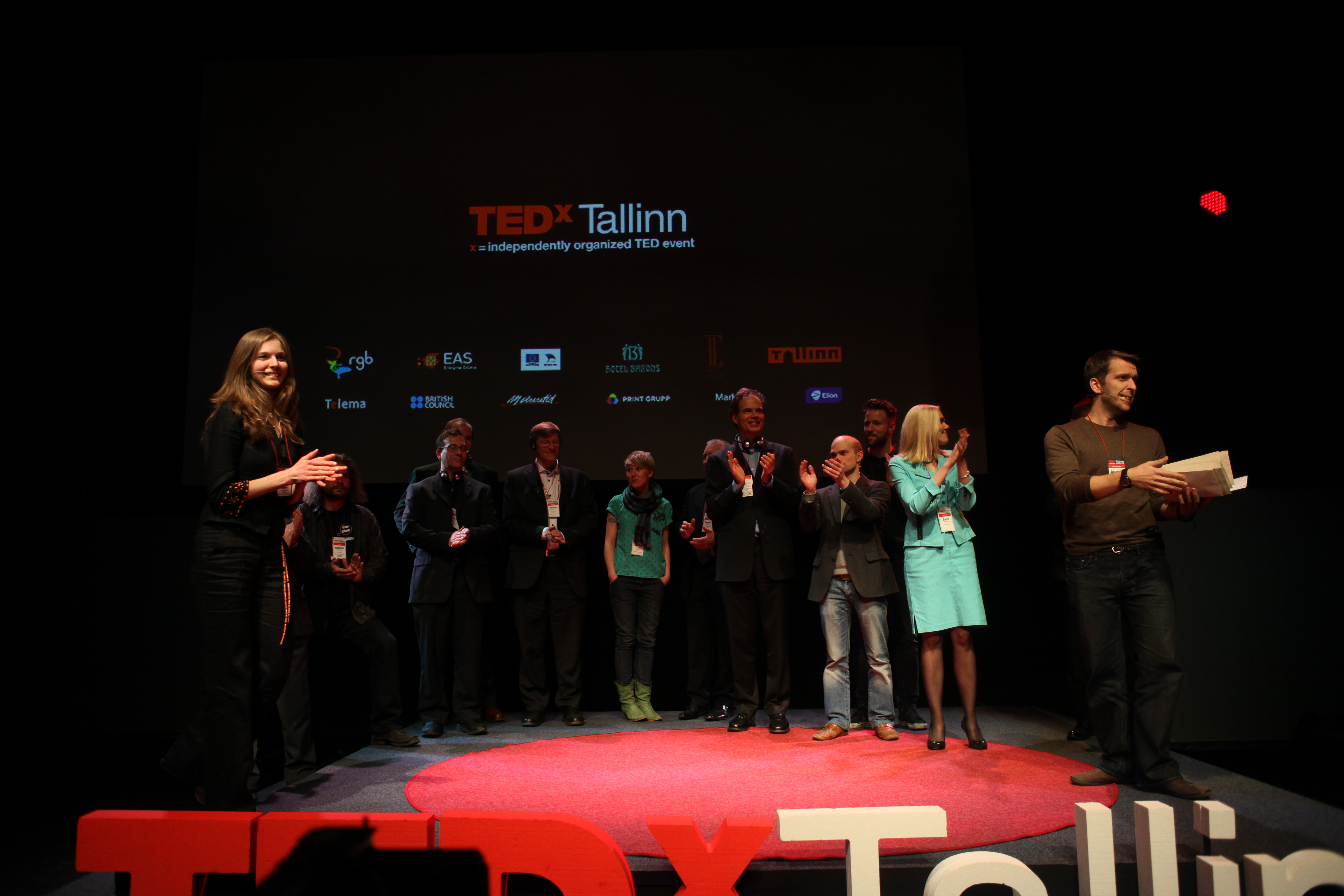 TEDxTallinn 2012 esinejad ja õhtujuhid.